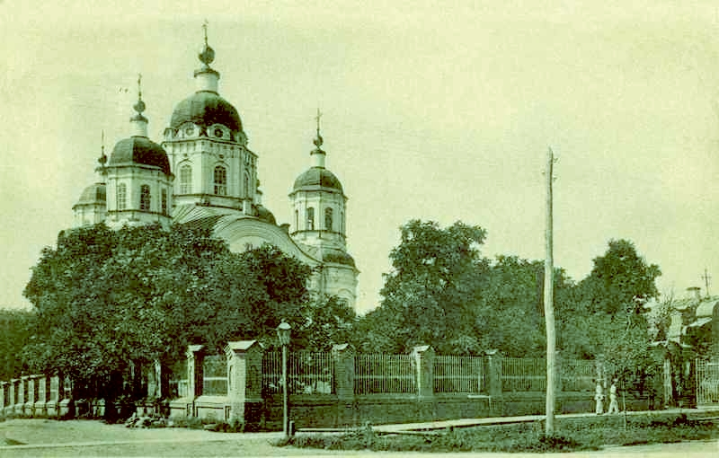 Полтава. Воскресенська церква, початок 20 ст.英语：Poltava. Church of the Resurrection, early 20th century.